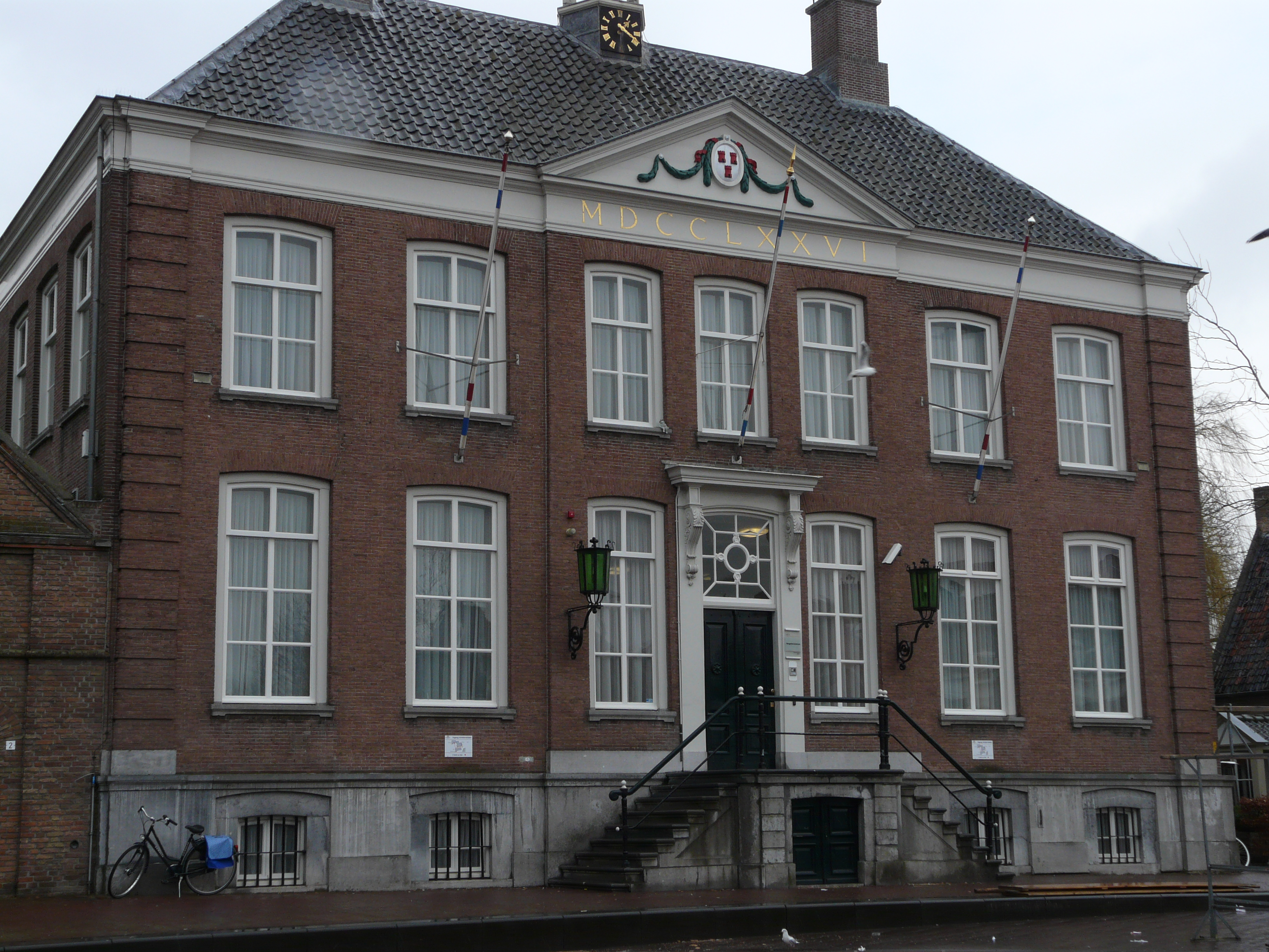 Gemeentehuis op de Markt in Etten-Leur